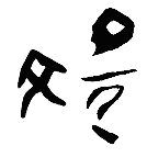 陶村遺址出土之疑似文字符號